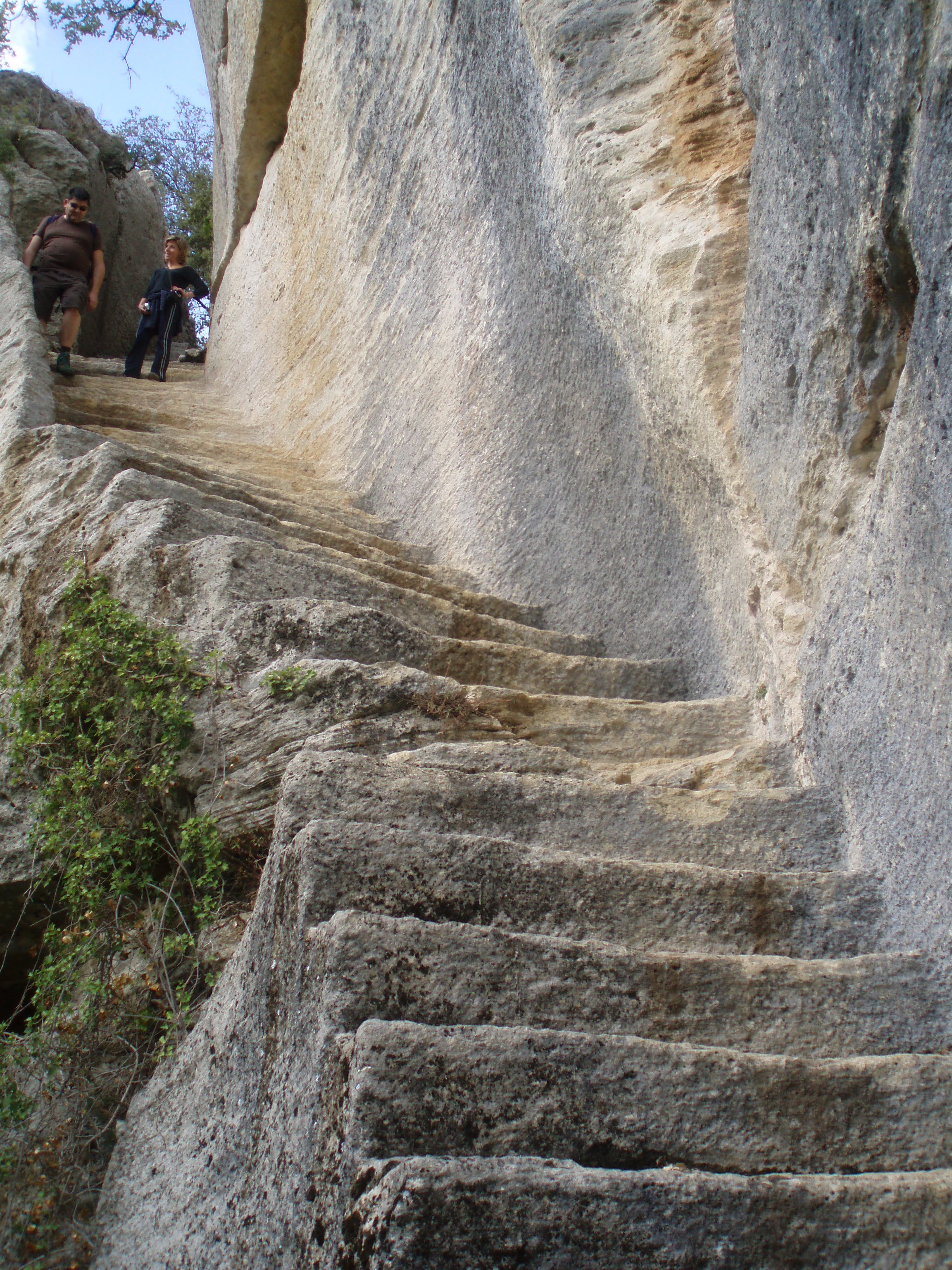 Escalier secret taillé dans la roche du fort de Buoux